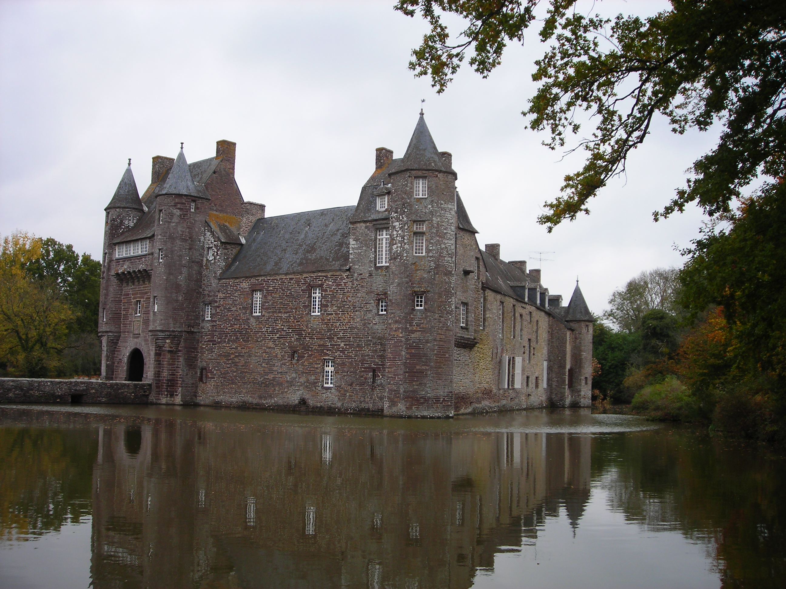 Château de Trécesson (Morbihan)